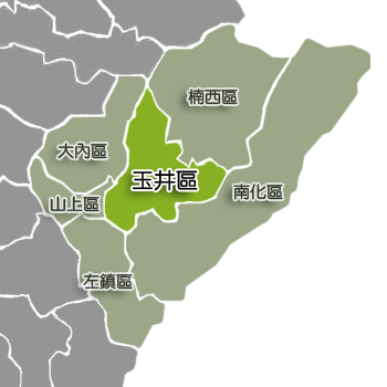 臺南市玉井區相對位置。